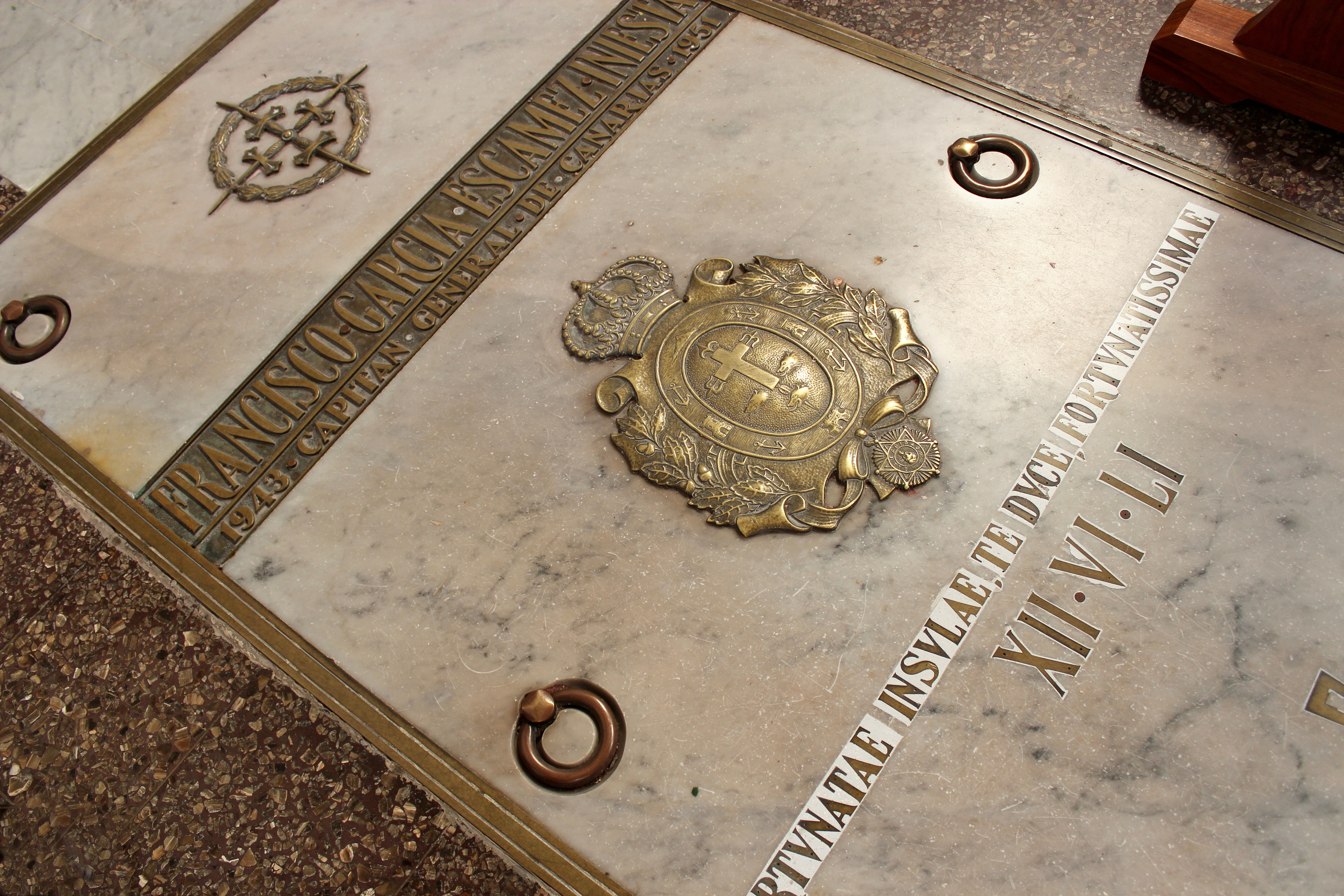 Tumba del General García Escámez. Iglesia de San Fernando Rey. Barrio de García Escámez, Santa Cruz de Tenerife. Islas Canarias.